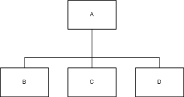 JSP Sequence